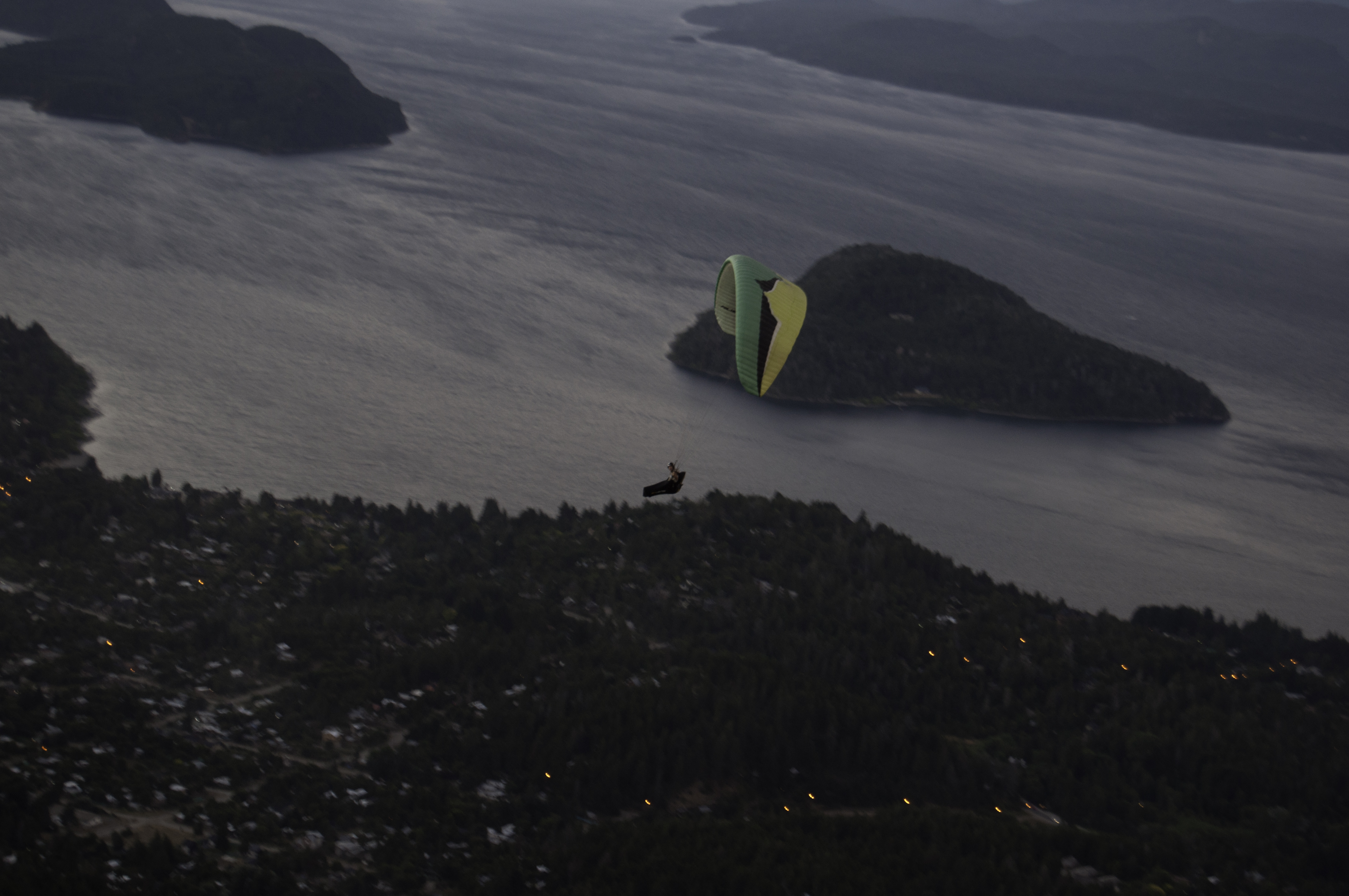 rush4 entrando el catabatico